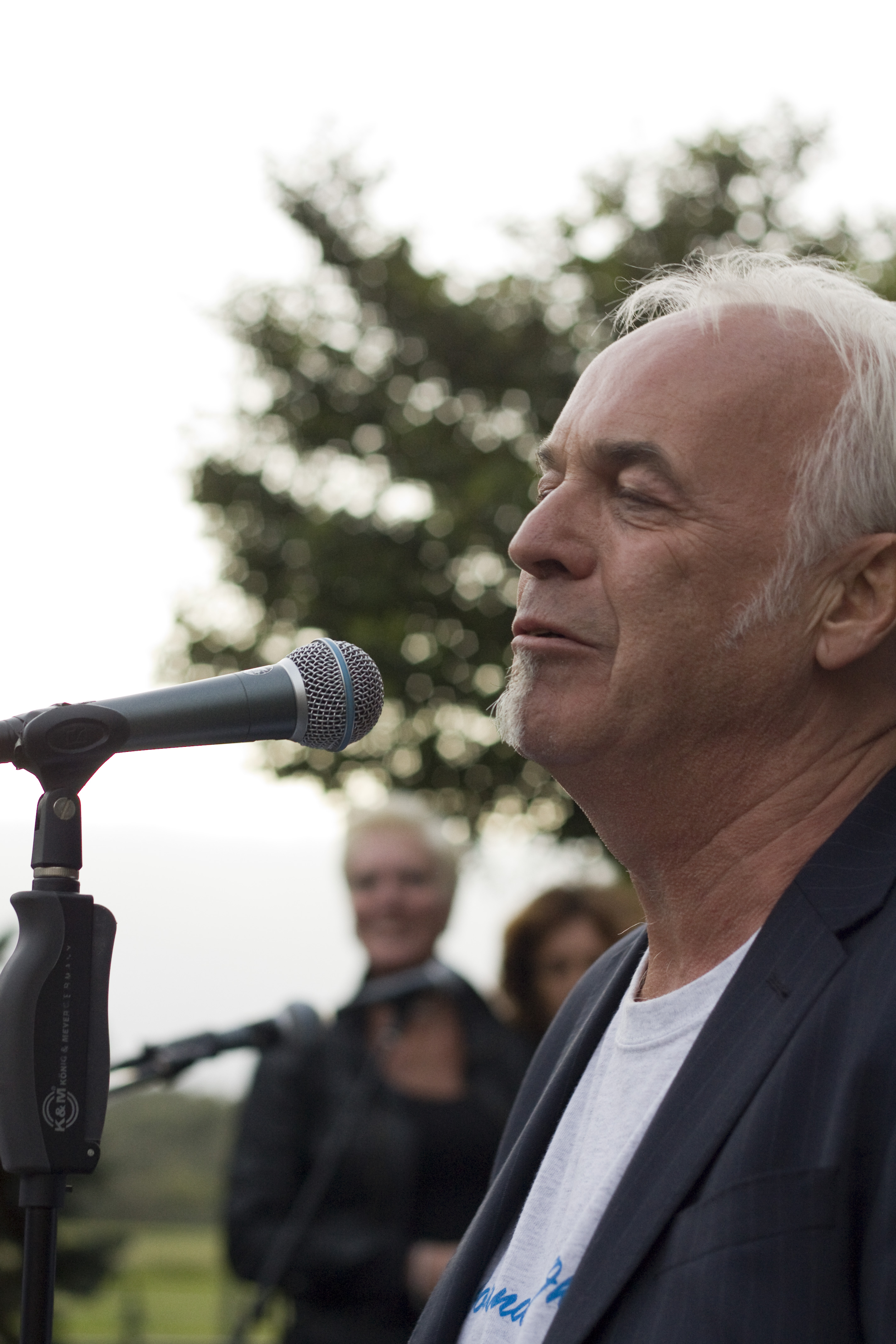 Nederlands producer en componist